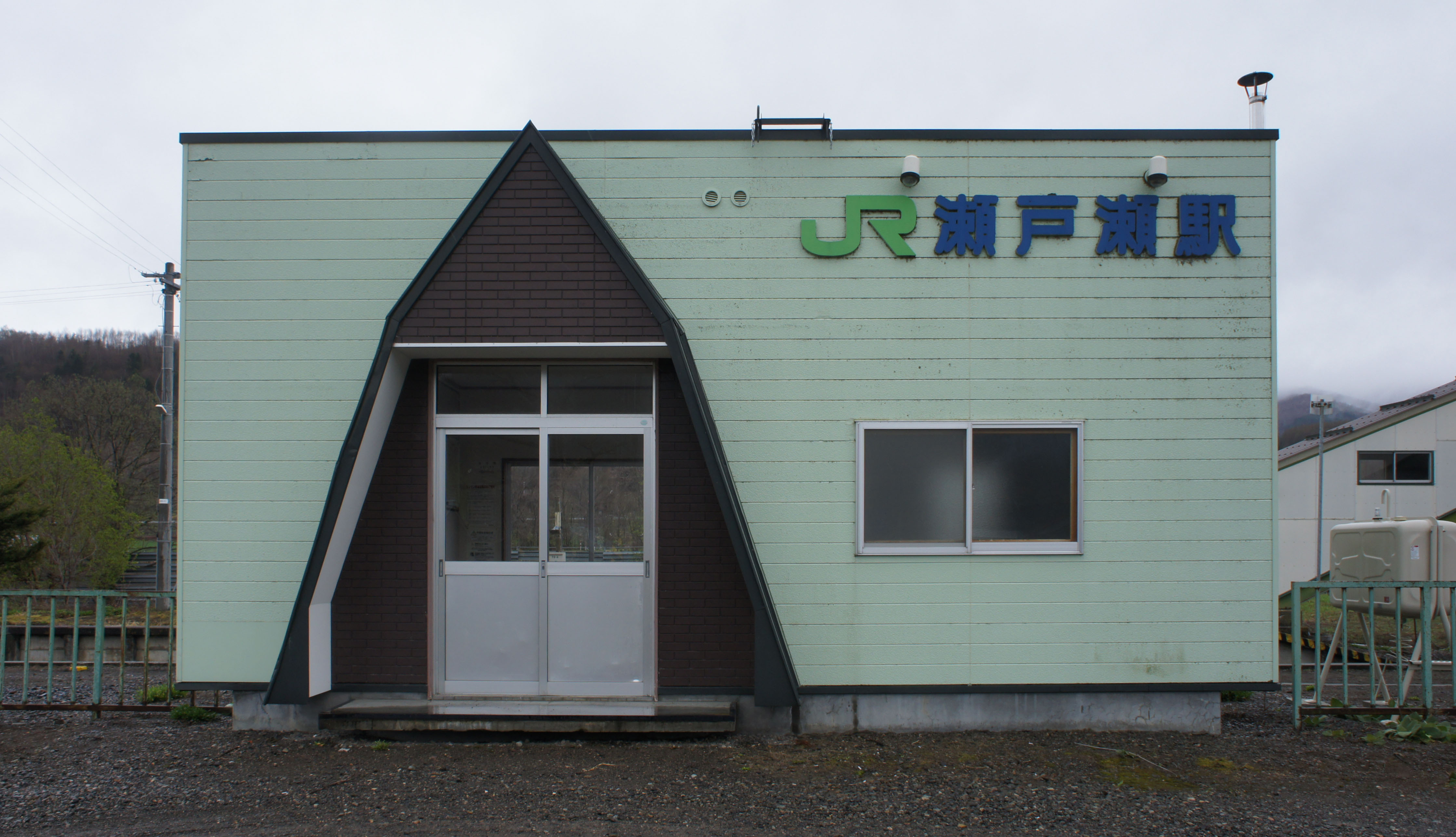 JR石北本線・瀬戸瀬駅の駅舎